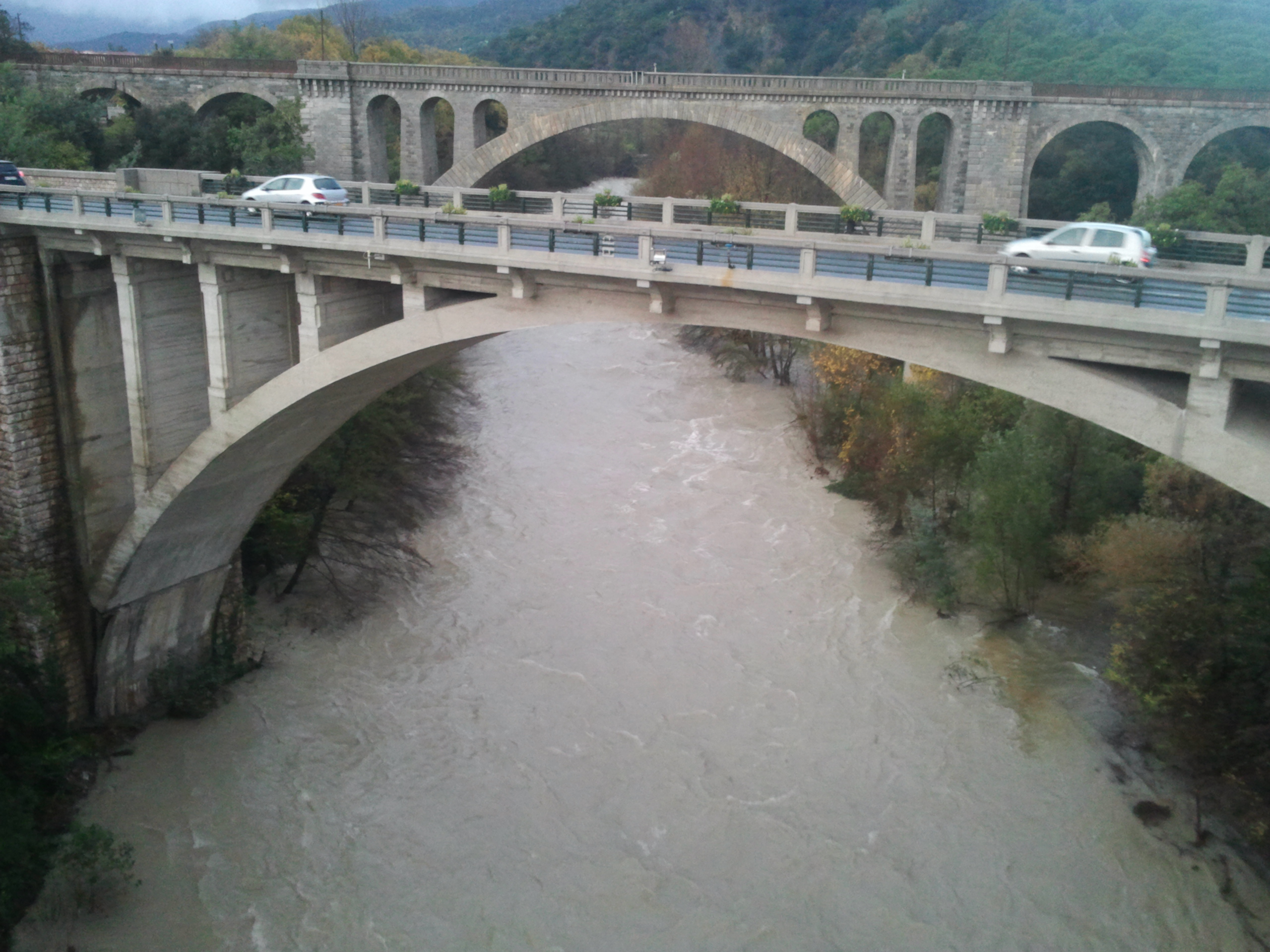 Ponts sur le Tech à Céret vus du pont du Diable